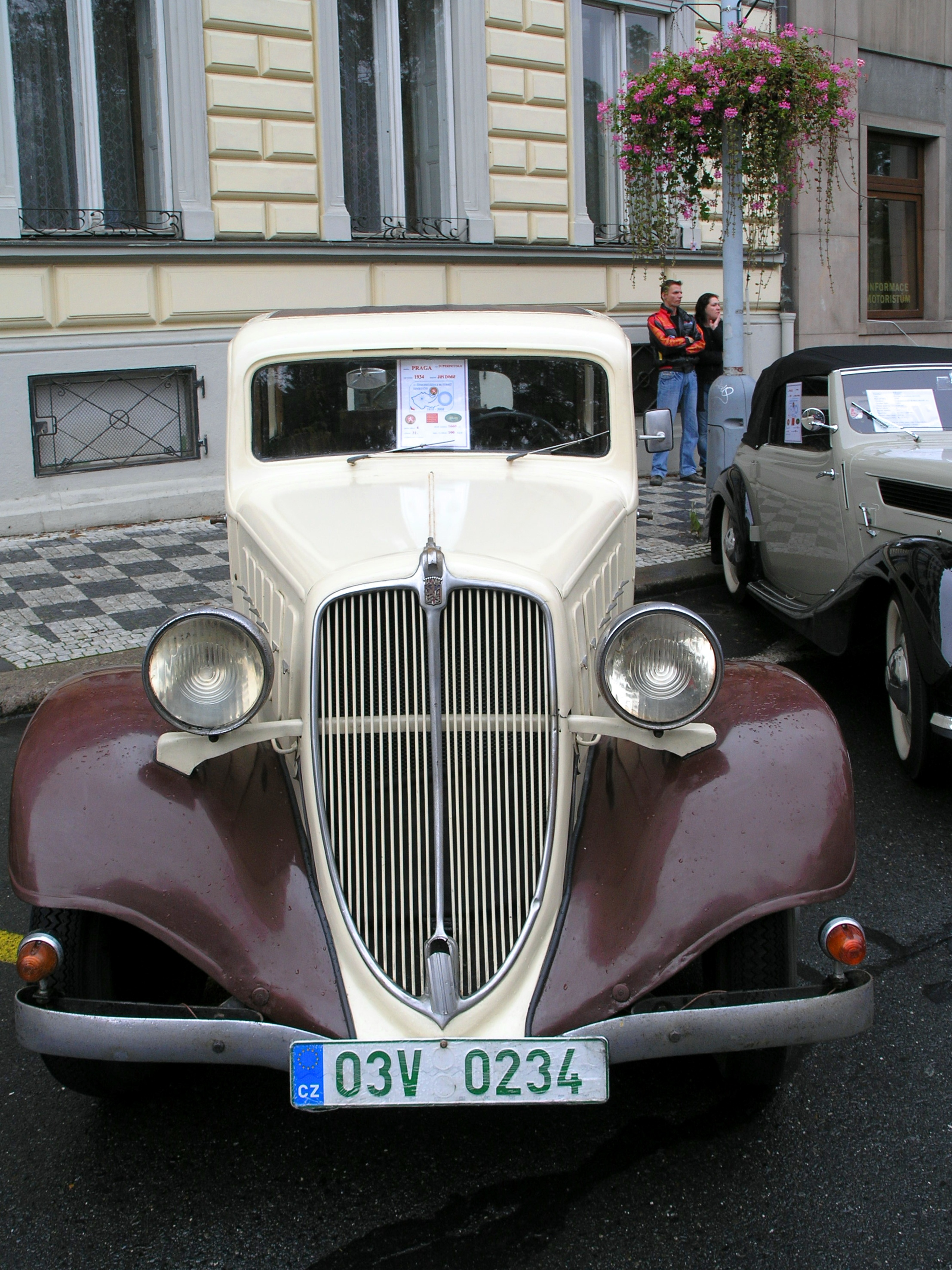 Vůz Praga Super Piccolo (1934) účastnící se jízdy veteránů u příležitosti 90. výročí vzniku samostatného Československa, 28. října 2008